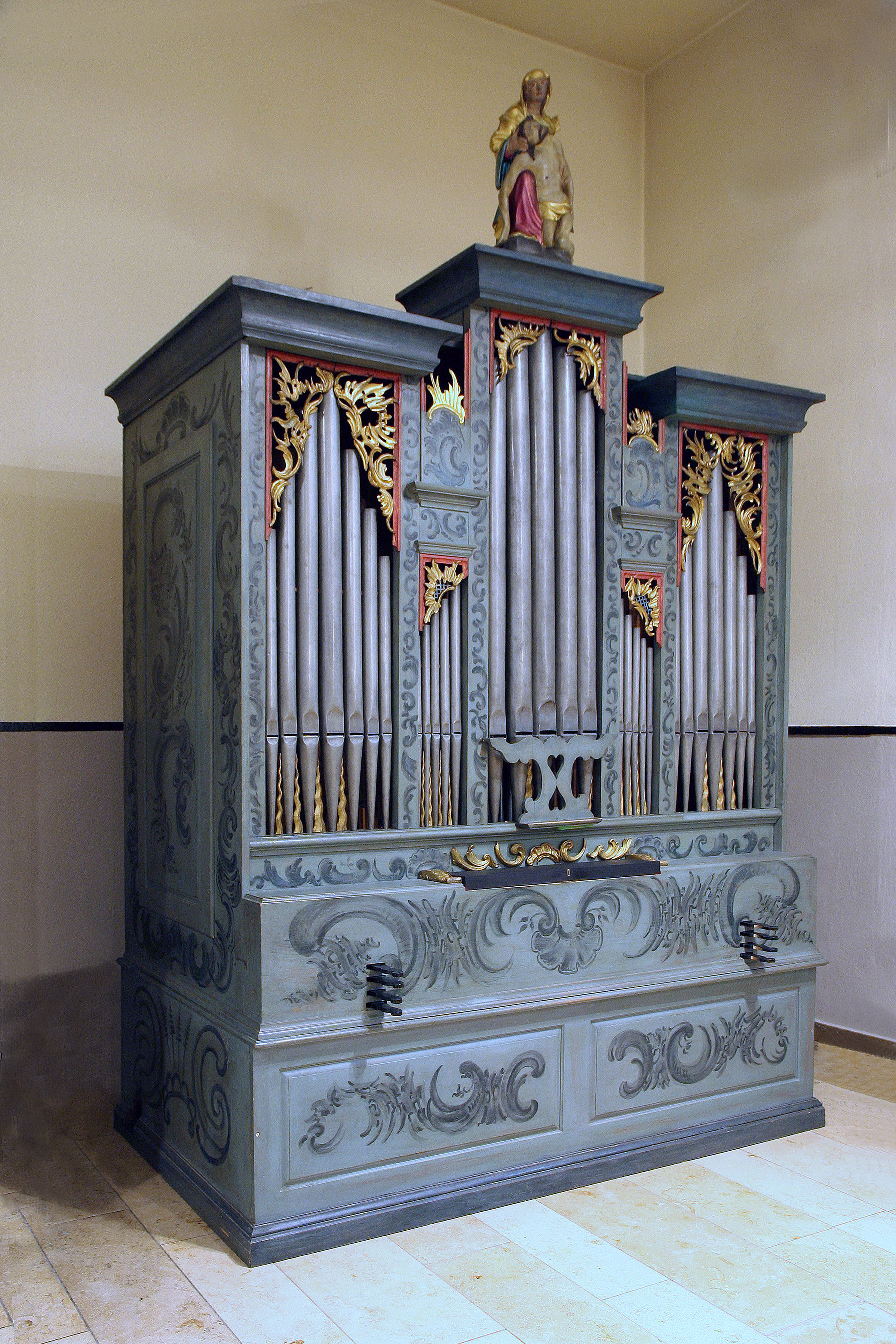 Römisch-katholische Kirche St. Maria Biel/Bienne, Looser-Orgel von 1770 in der Krypta